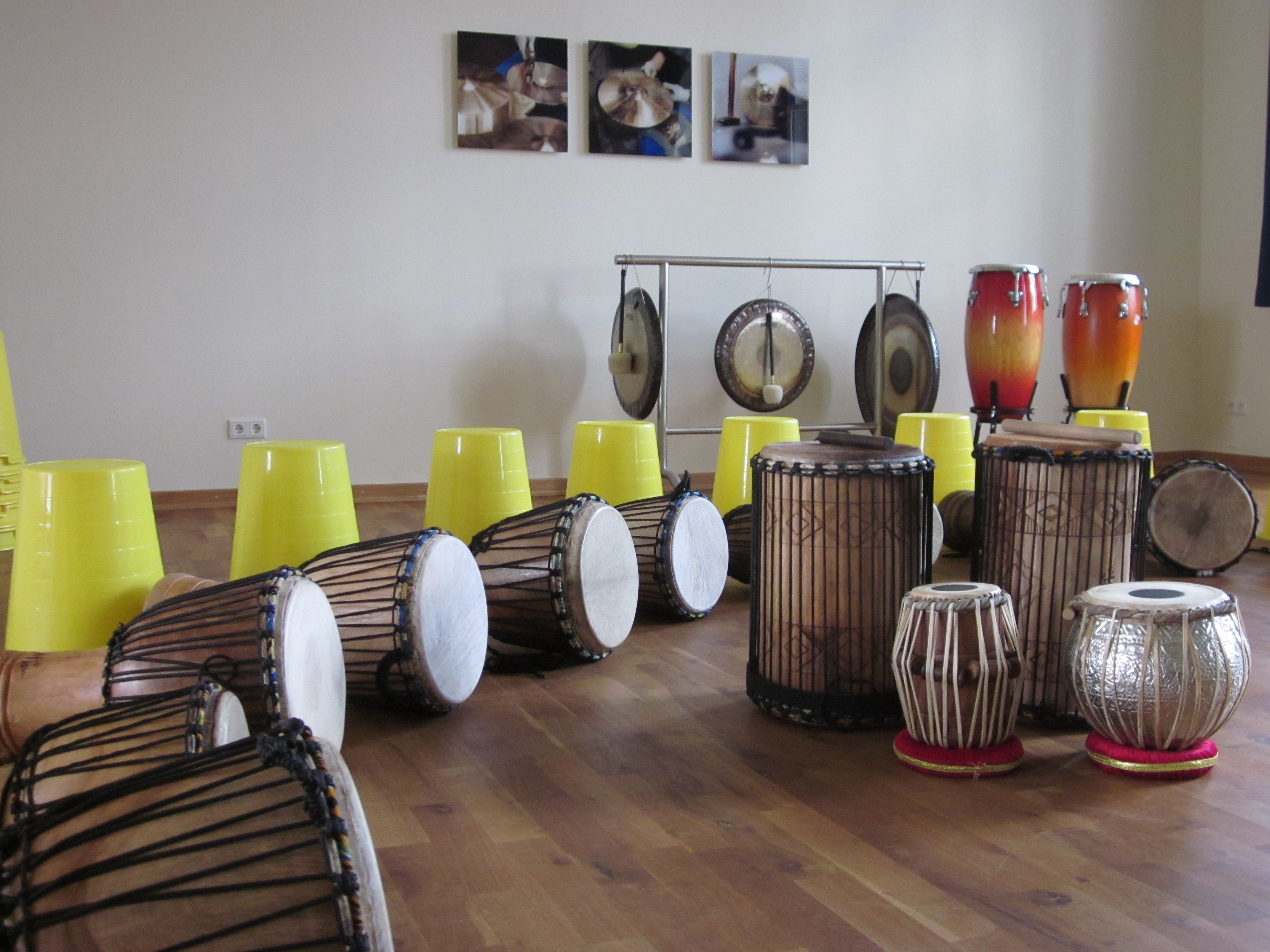 Musiculum Schlaginstrumente